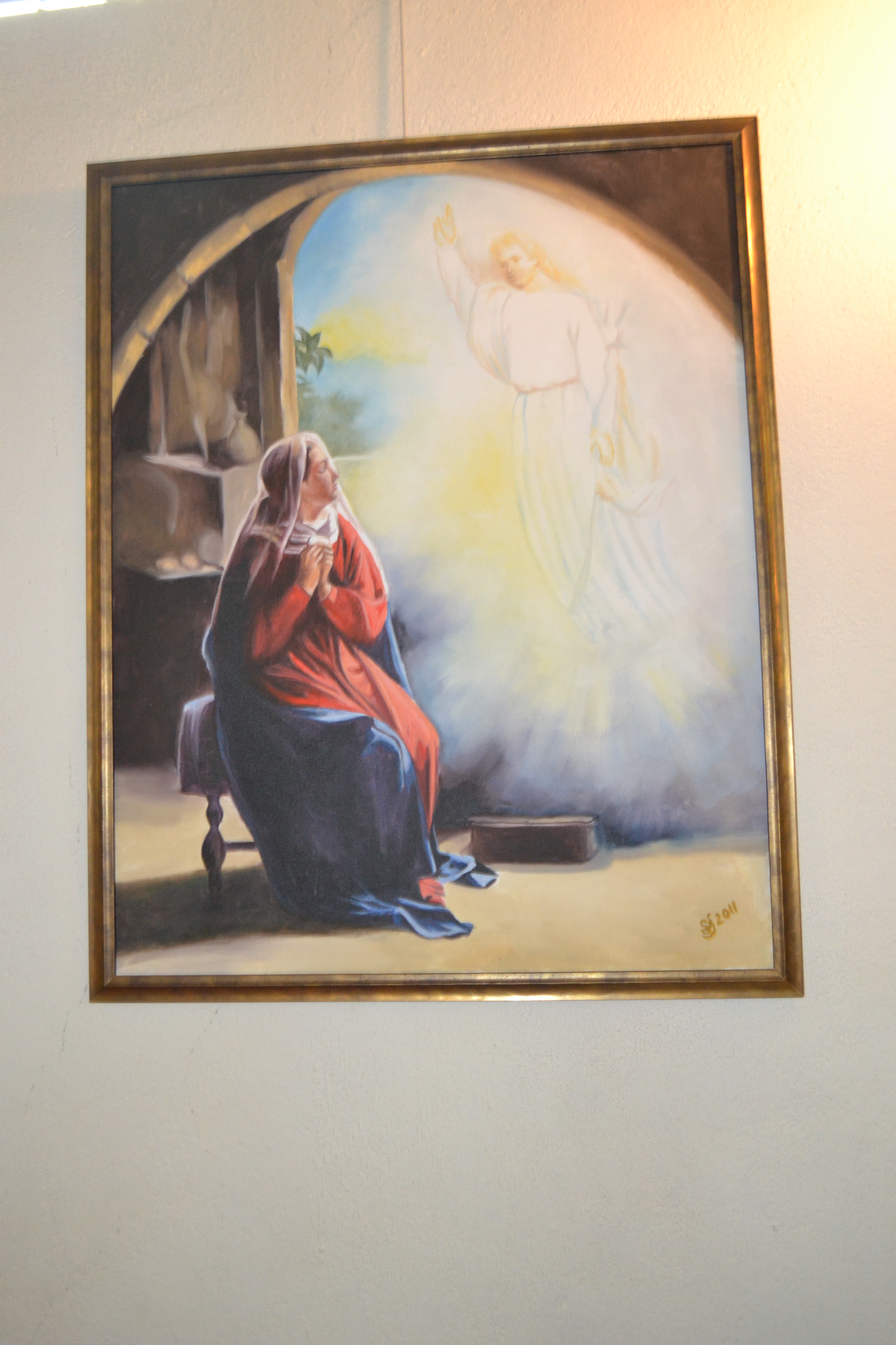 Sankt Olai kyrka in Norrköping